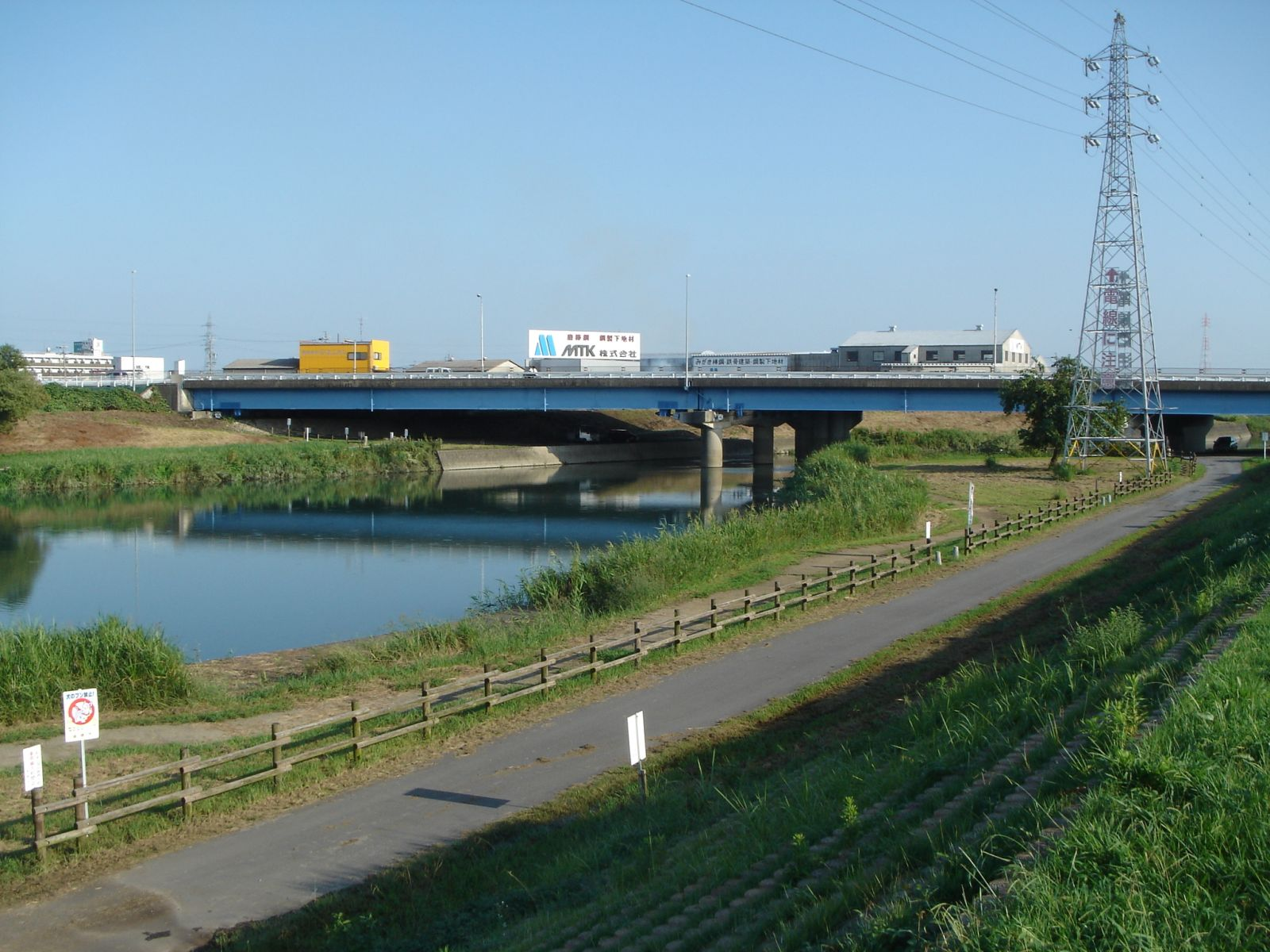 五六川に架かる五六川（国道21号）、岐阜県瑞穂市の上流側より撮影